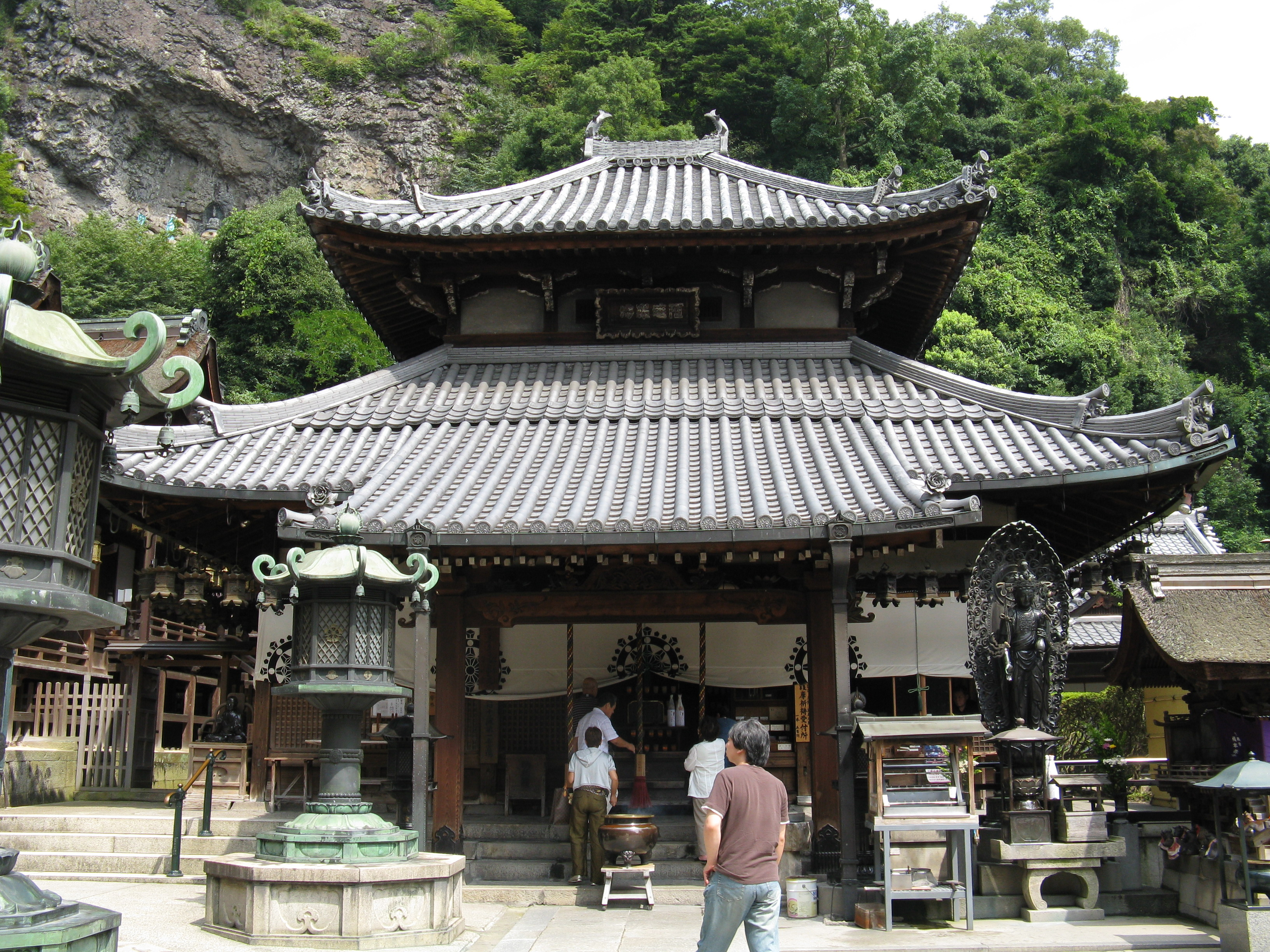 宝山寺 本堂